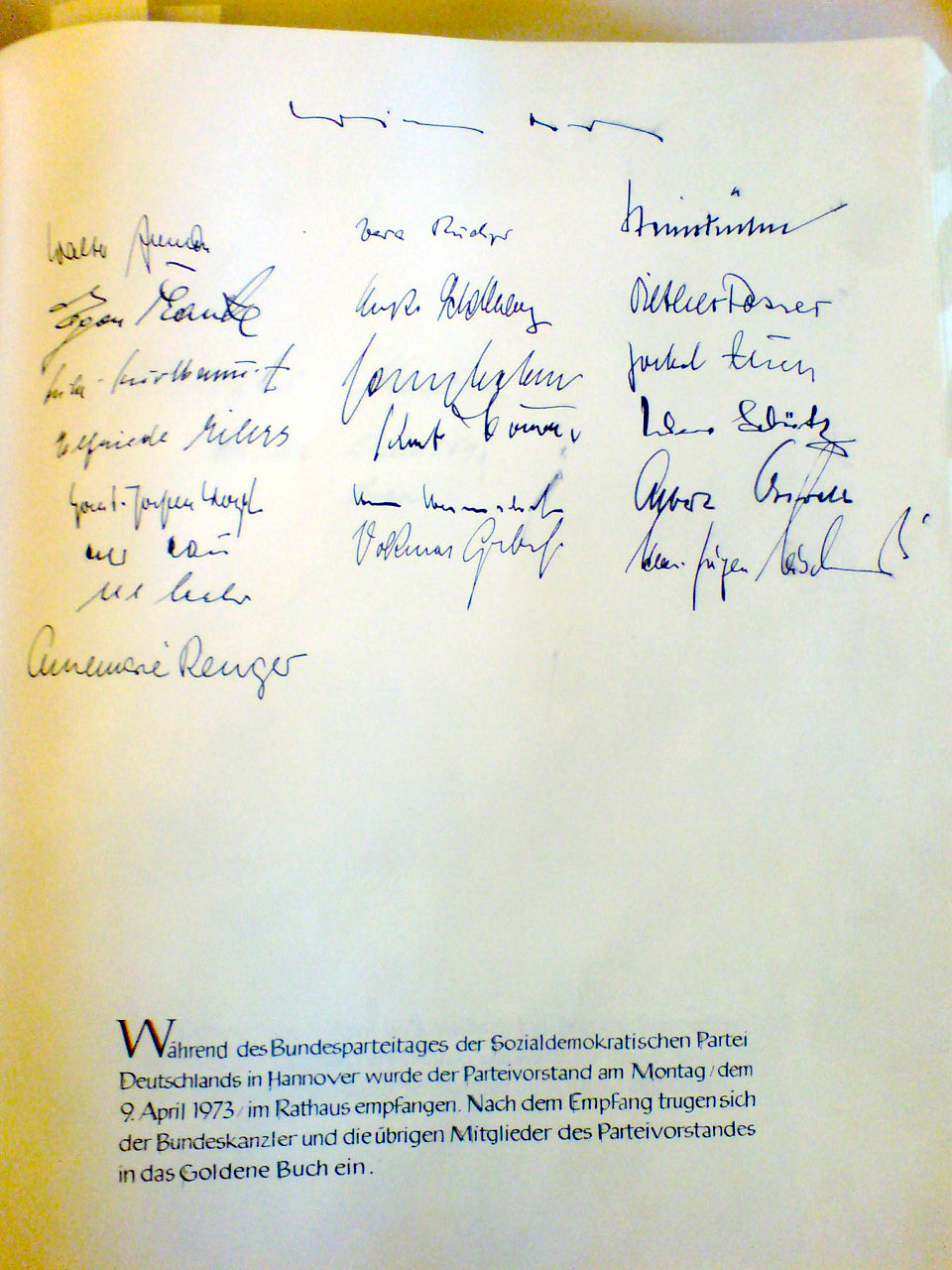 Goldenes Buch (Hannover): "Während des Bundesparteitages der Sozialdemokratischen Partei Deutschlands in Hannover wurde der Parteivorstand am Montag, den 9. April 1973 im Rathaus empfangen. Nach dem Empfang trugen sich der Bundeskanzler und die übrigen Mitglieder des Parteivorstandes in das Goldene Buch ein."